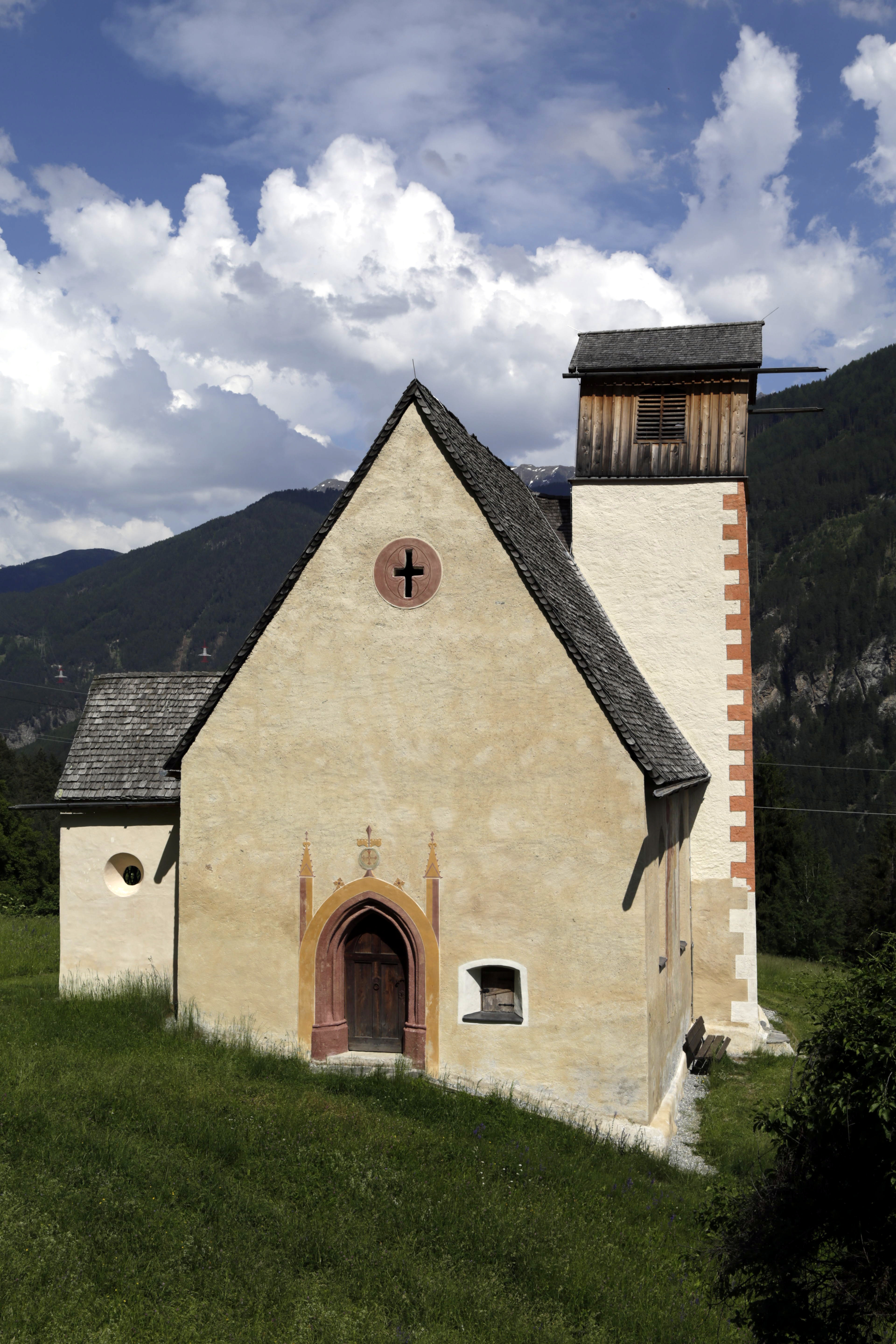 Die katholische Filialkirche des Heiligen Georg ob Tösens, befindet sich in der Gemeinde Serfaus, und ist denkmalgeschützt.